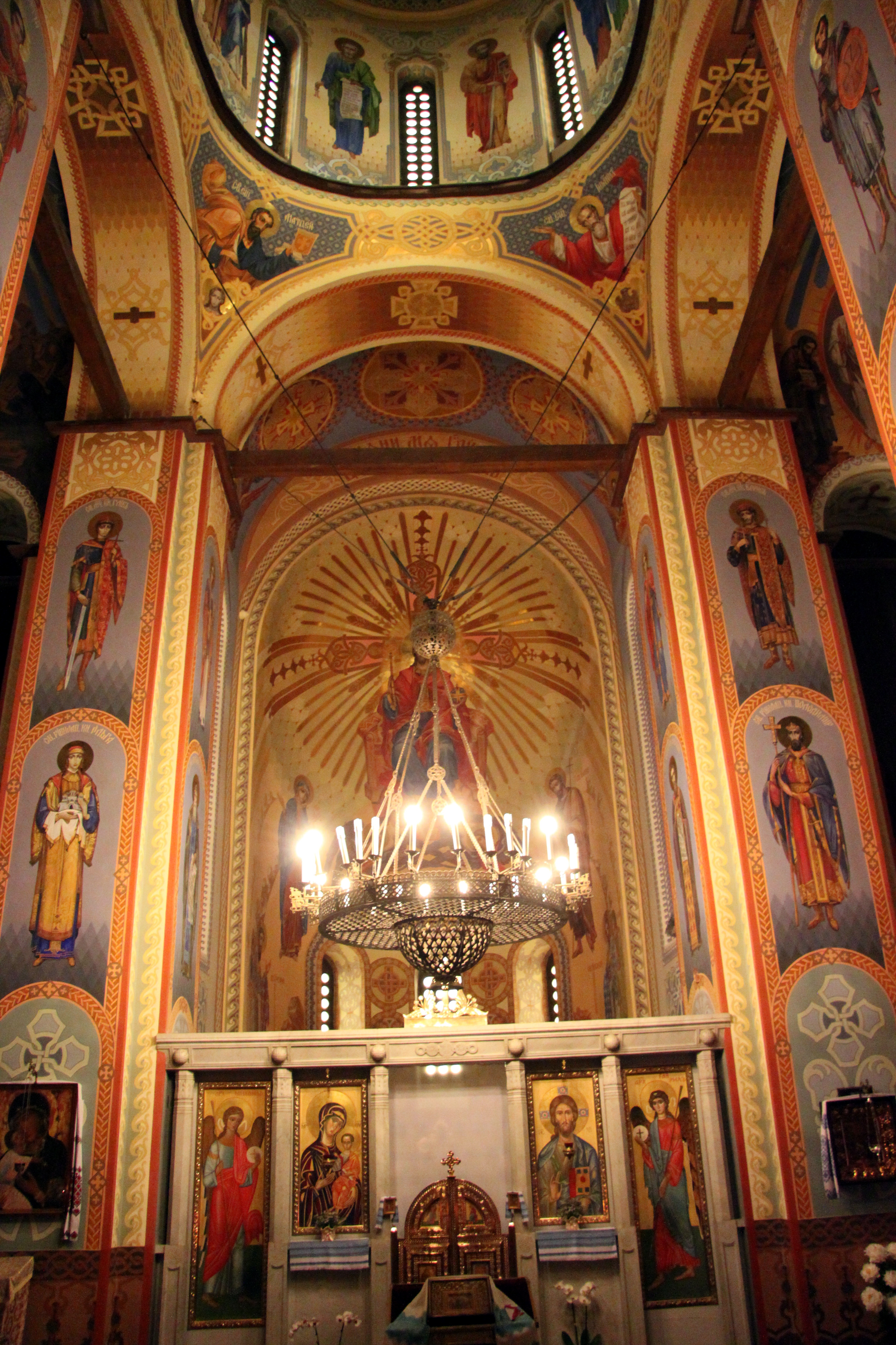 Фундаменти та залишки стін церкви Богородиці Пирогощі, Київ, Контрактова пл.